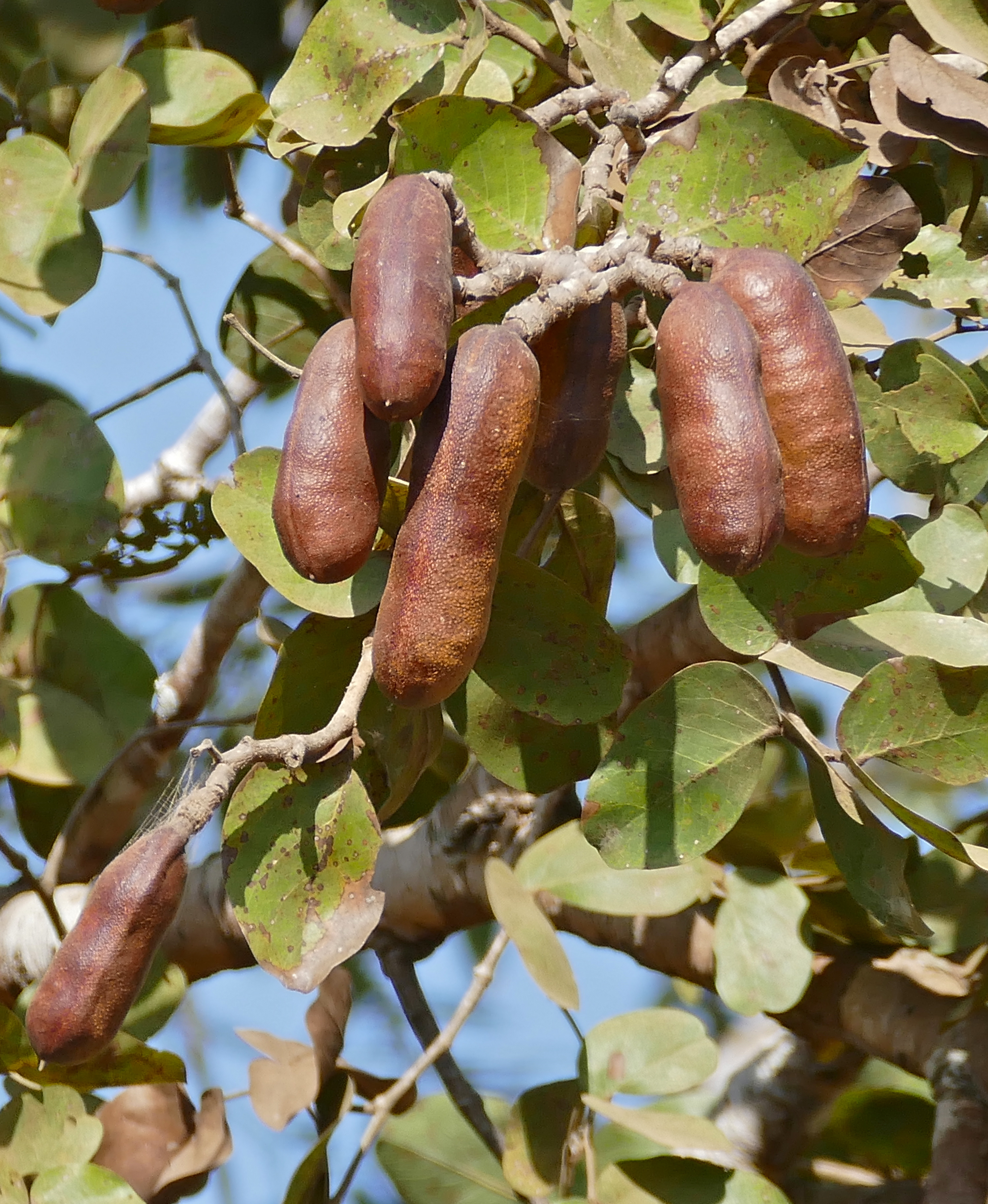 Transpantaneira, Poconé, Mato Grosso, BRAZIL